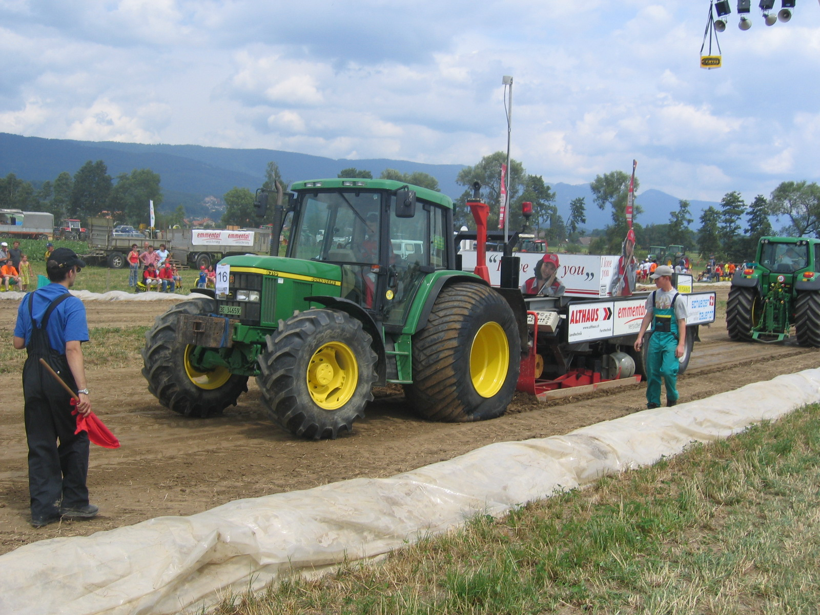 John Deere 6310, Standardtraktor in der 6-Tonnen-Klasse mit Pullerpneus (Terrareifen) beim Tractorpulling in Schwadernau, Schweiz, 2005. Der John Deere 6310 hat in Schwadernau 2005 in der 6-Tonnen-Standardklasse gewonnen.